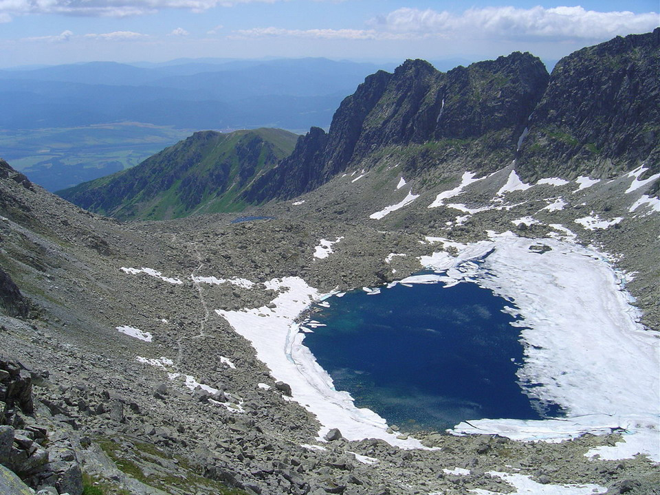 Furkotsk dolina from Bystre sedlo below Furkotsky stit